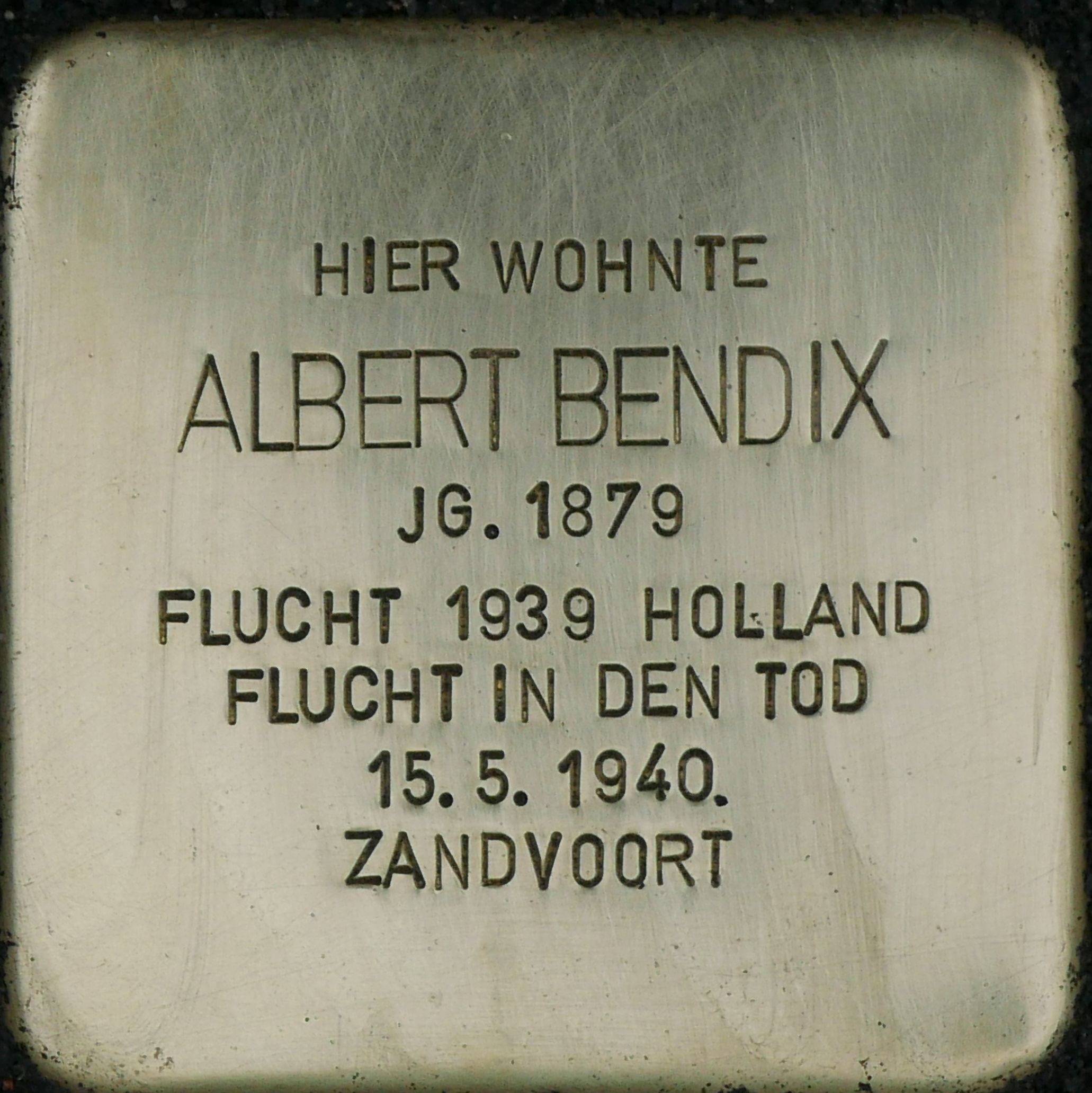 Stolpersteinverlegung für Albert Bendix, Hültzstraße 24